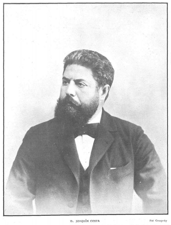 Retrato de Joaquín Costa, obra de Manuel Compañy, recogido en la revista española Actualidades.